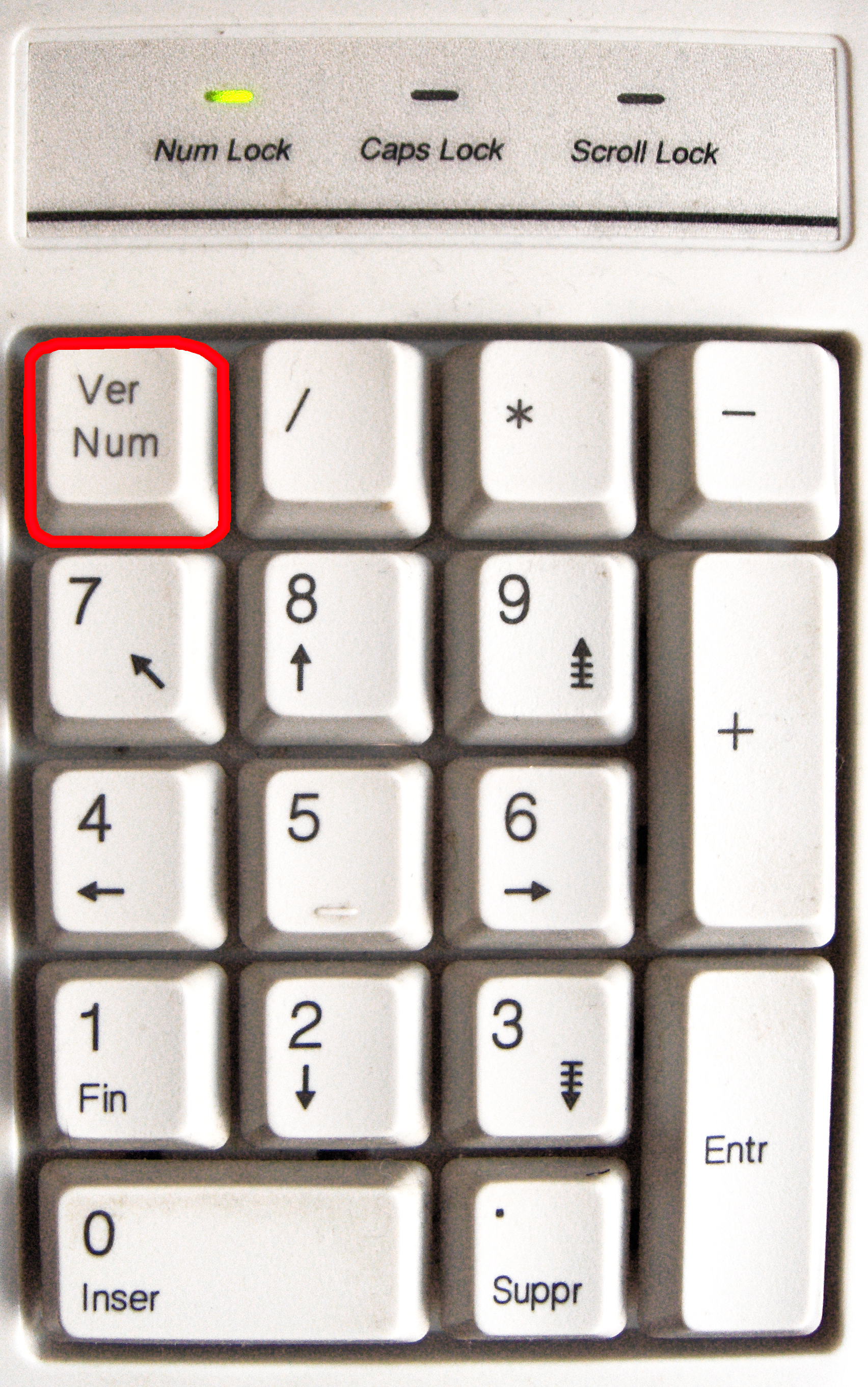 Pavé numérique avec Ver Num en rouge